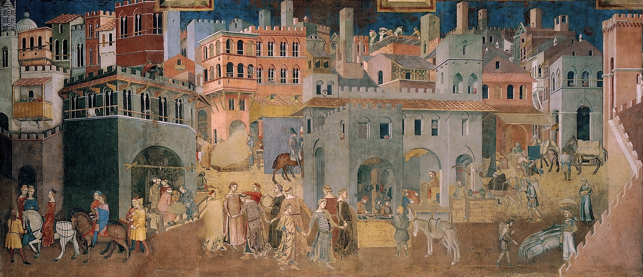 Si tratta di una serie di affreschi realizzati da Lorenzetti, contemporaneo al periodo del Governo dei Nove.L'autore voleva dare una rappresentazione del governo e delle conseguenze positive dello stesso nella società, e nella vita nella città di Siena.